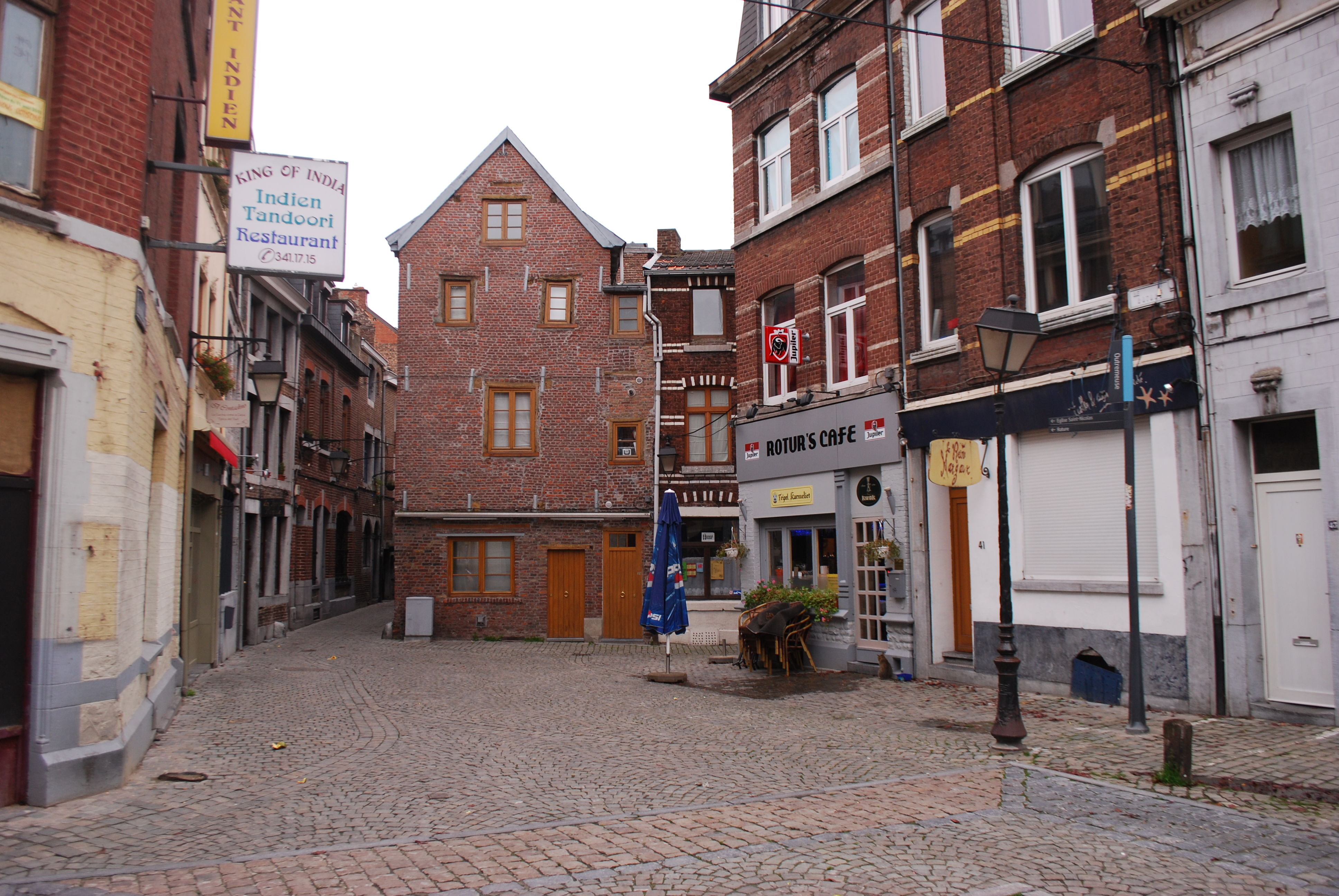 La rue Roture, dans le quartier d'Outremeuse à Liège.